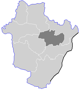 Lage des Kleingebietes Debrezin im Komitat.